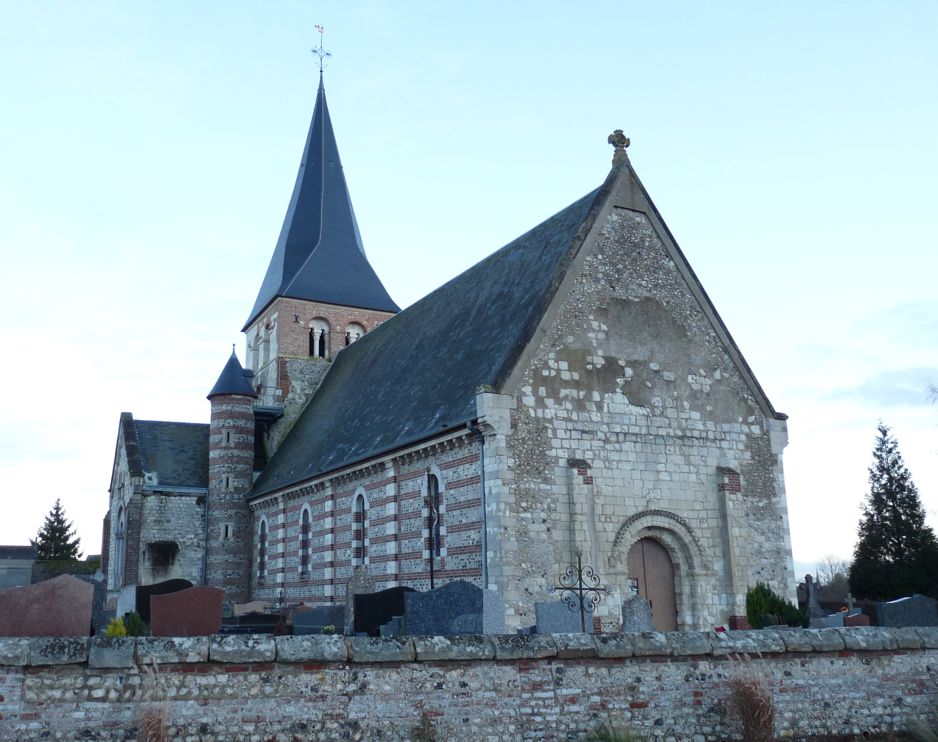 Église Notre-Dame d'Osmoy .